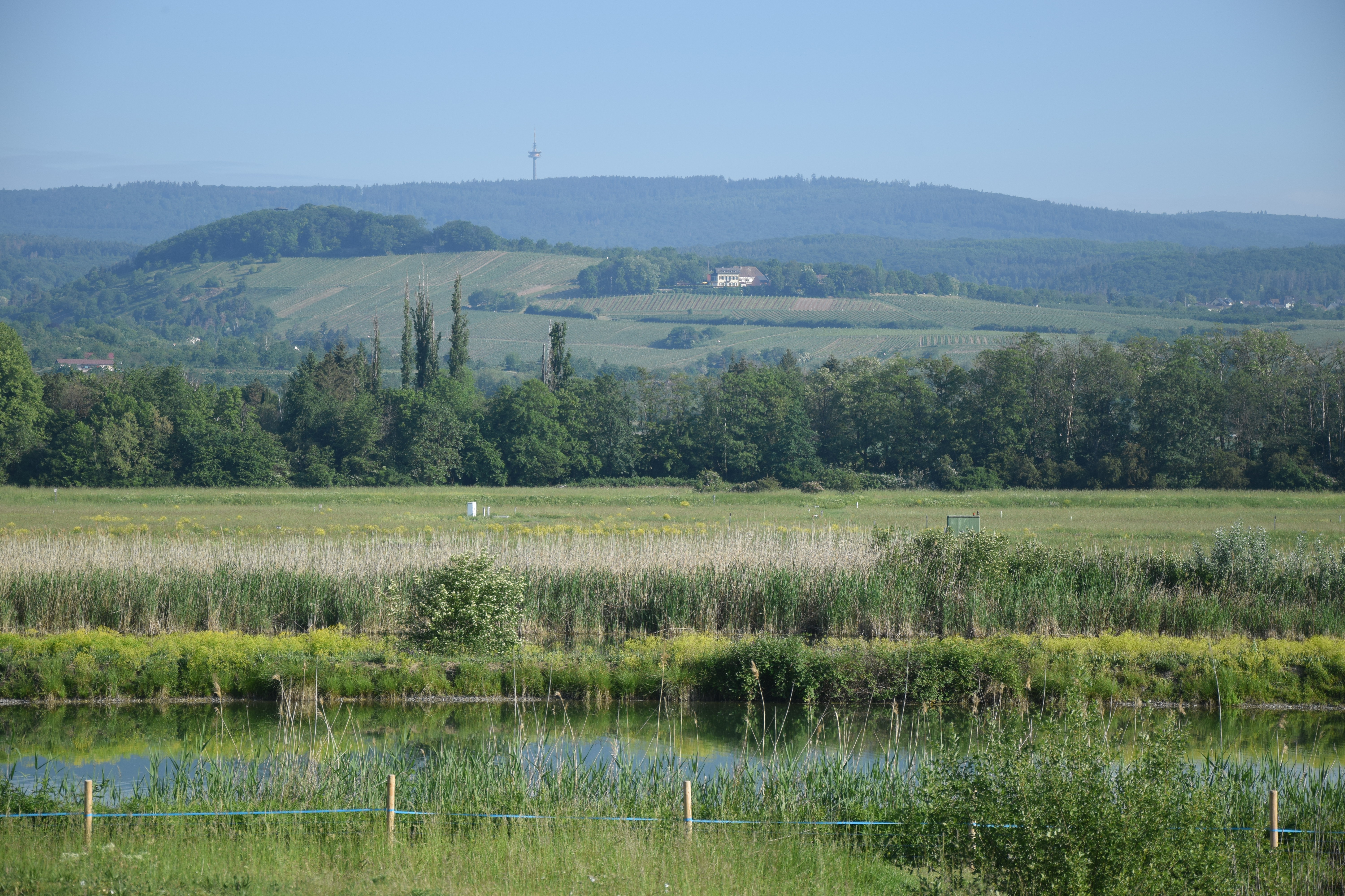 Wasserwerk Schierstein, dahinter Hof Nürnberg in Frauenstein sowie Turm der Hohen Wurzel im Taunus